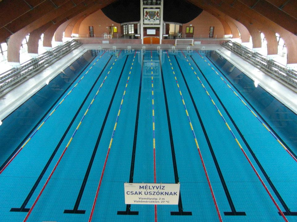 Kazincbarcika-Berente Fedett Uszoda. Kazincbarcika, Hadak útja 3.